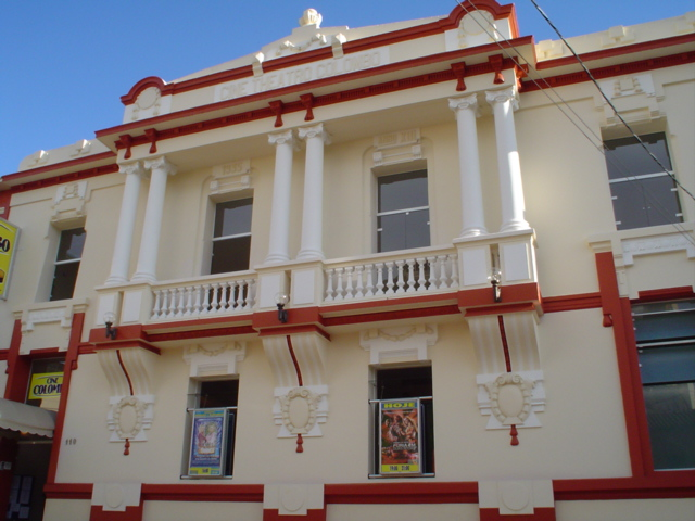 Cine Theatro Colombo, movie theater in São José do Rio Pardo (São Paulo State, Brazil). Italian style.